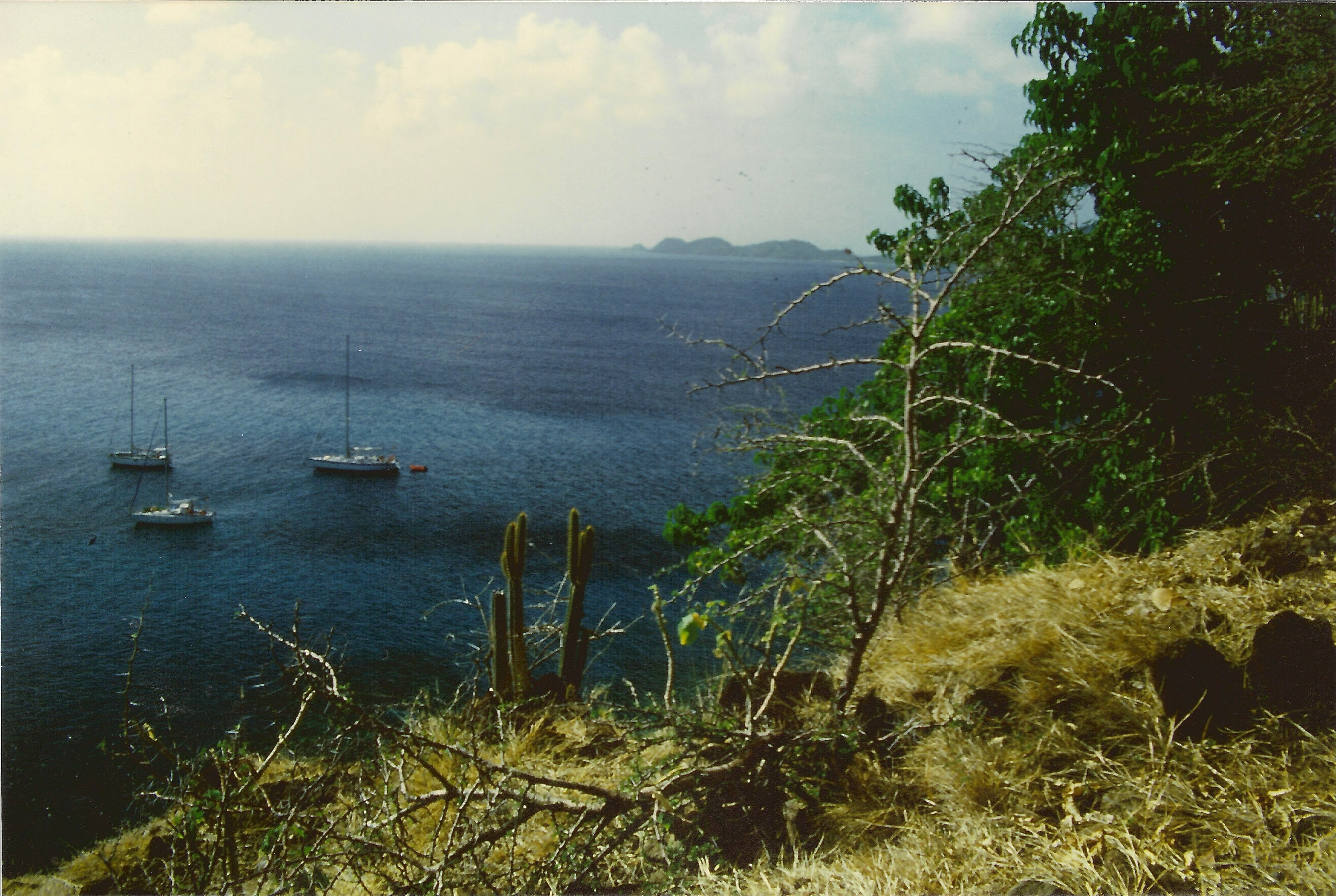 Petit Nevis